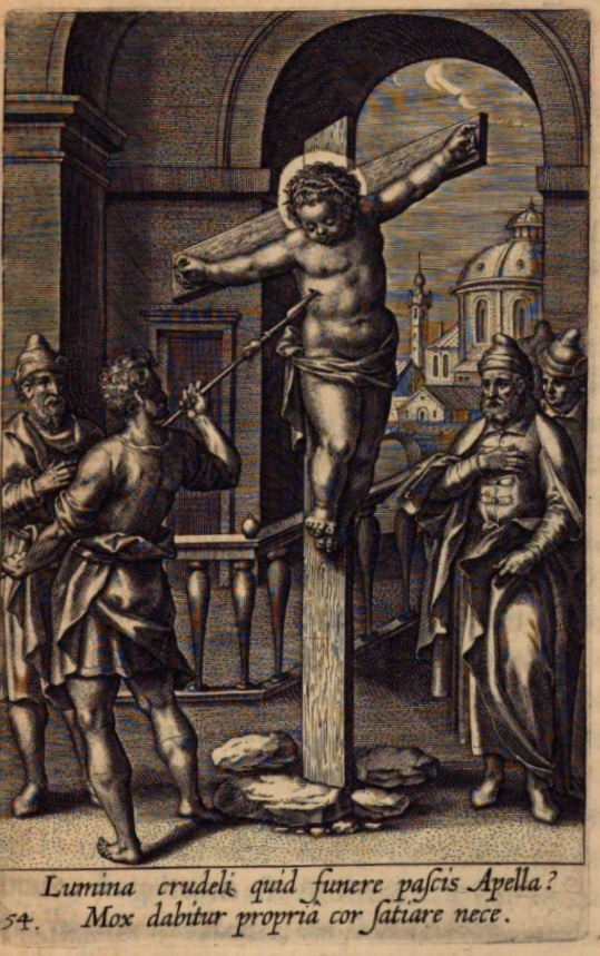 Pedro de Bivero: Sacrum sanctuarium crucis et patientiae crucifixorum et cruciferorum, emblematicis imaginibus laborantium et aegrotantium ornatum..., Amberes, Baltasar Moreto, 1634. Guillermo de Norwich. Ejemplar de la Universidad Complutense de Madrid.